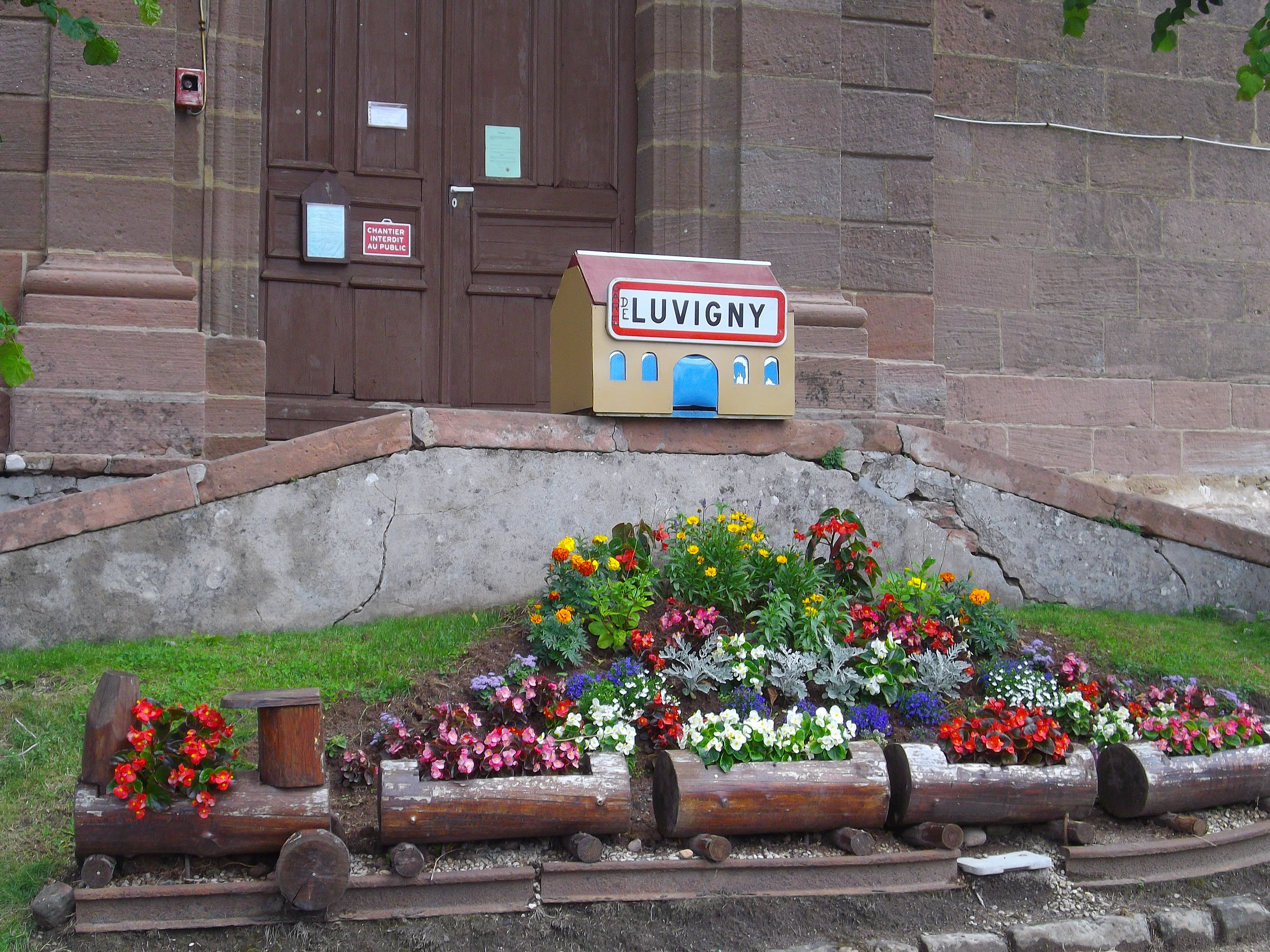 train et gare en bois à luvigny